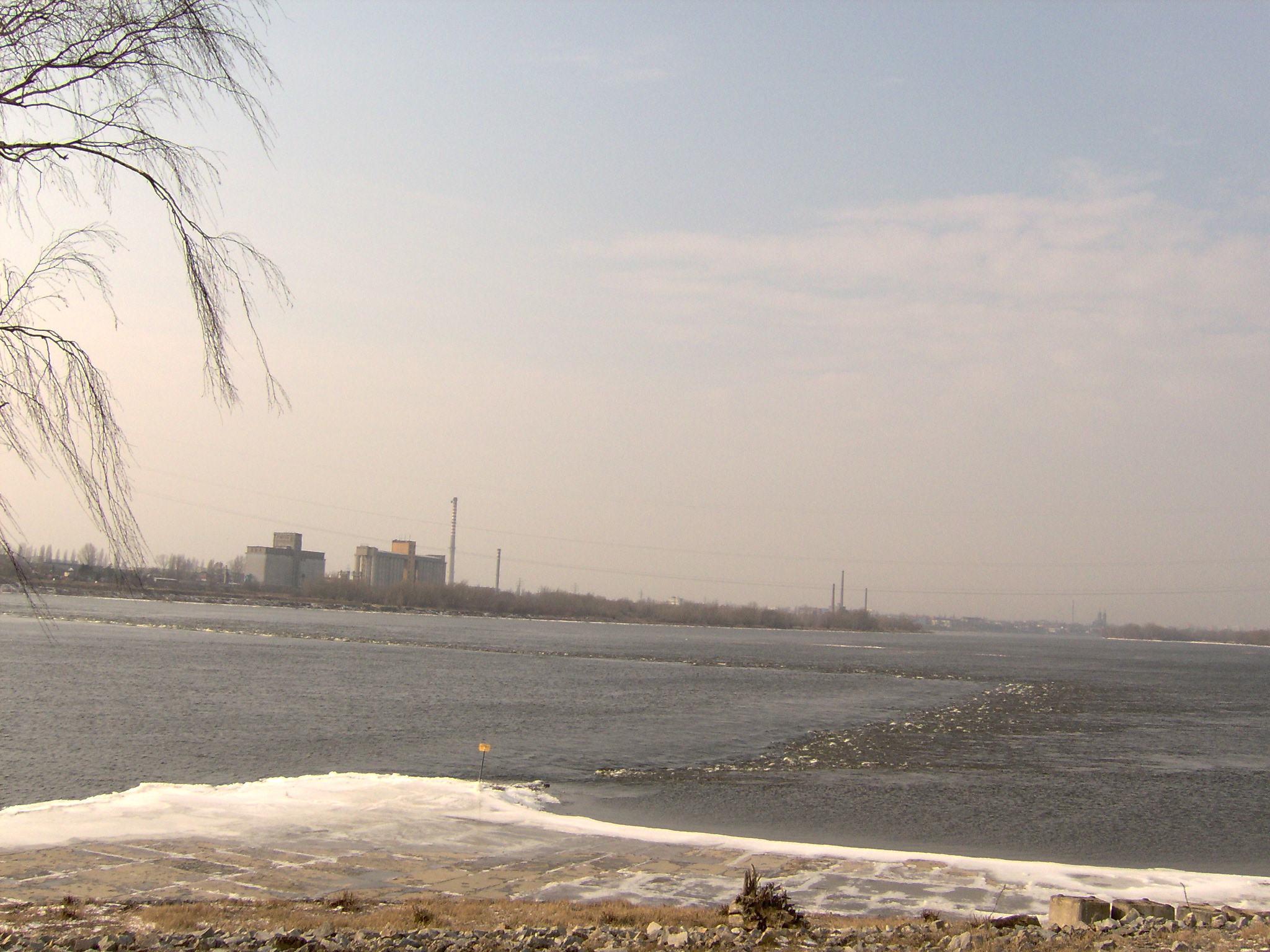 Zapora wodna na Wiśle i okolice (2007 r.)